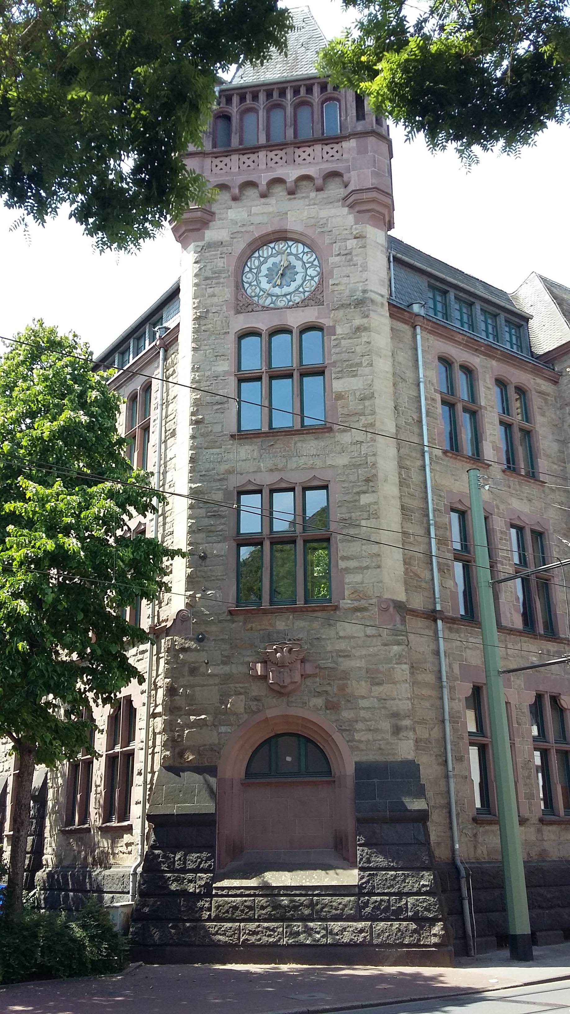 Aletta-Haniel-Gesamtschule